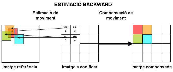 Esquema fet especialment per a l'ocasió